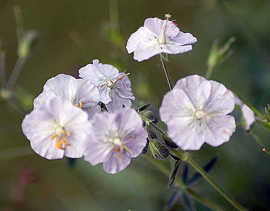 Geranium phaeum album